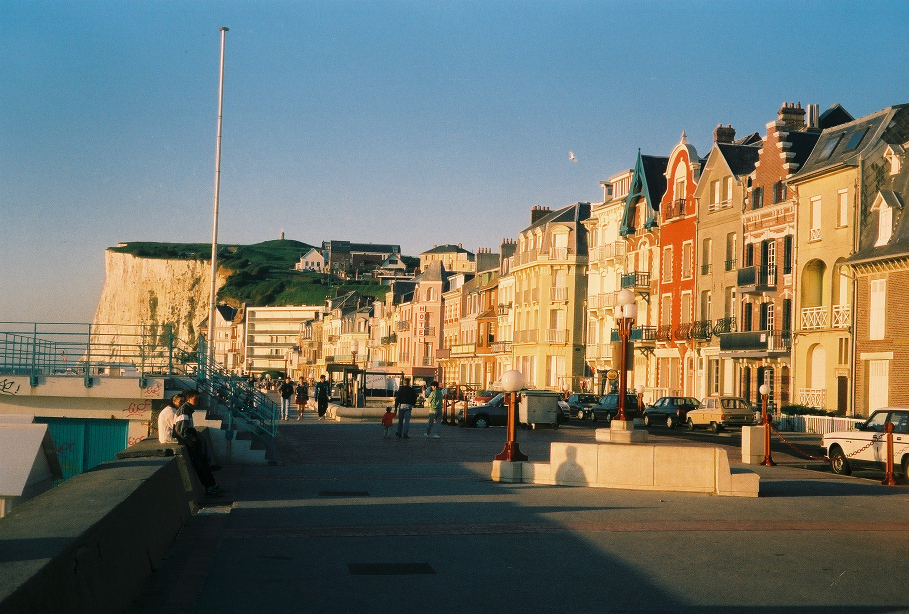 Mers-les-Bains promenade